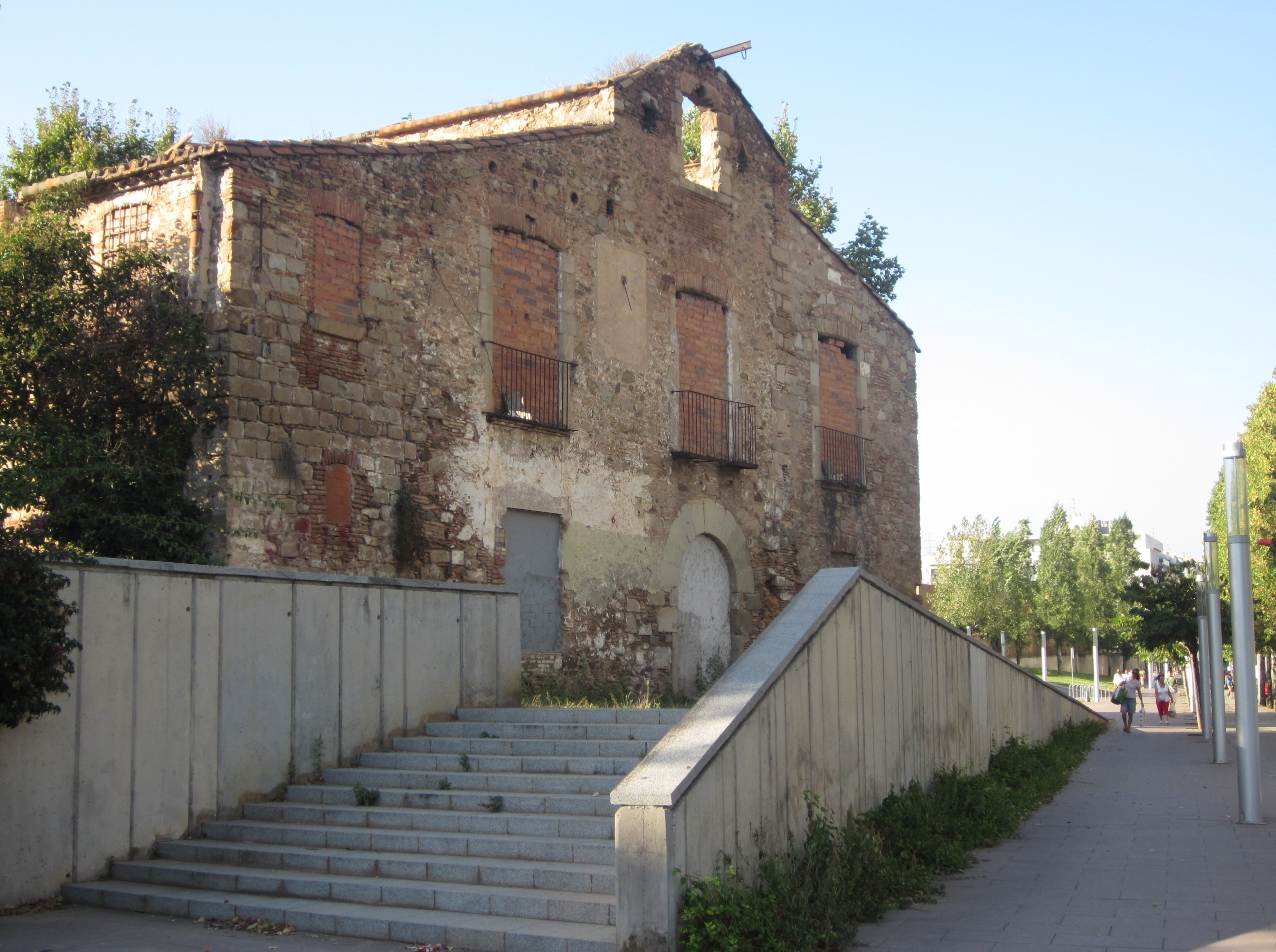 Masia de Can Valent, vista des de l'Avinguda Rio de Janeiro. Districte de Nou Barris, Barcelona.